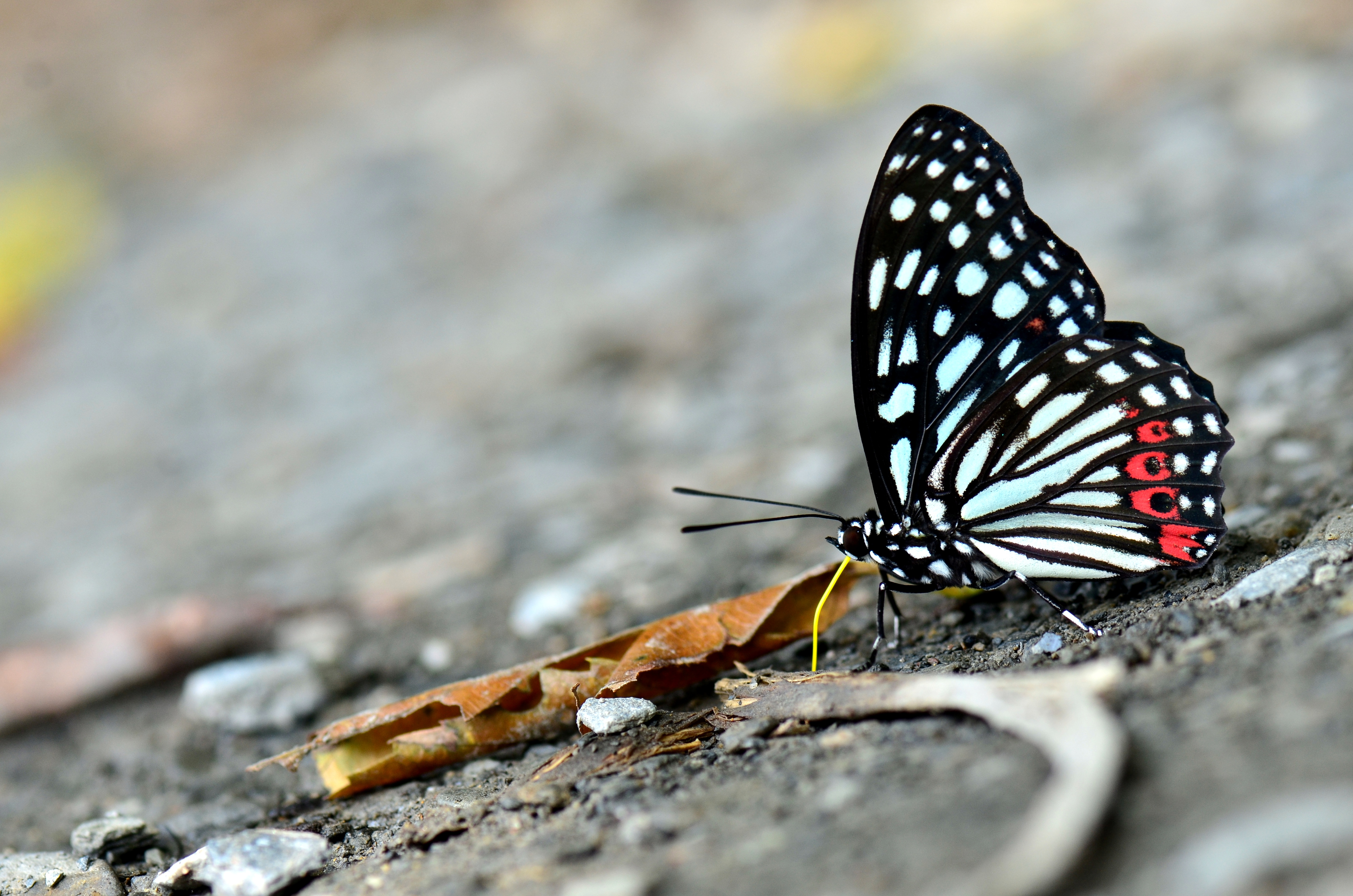 366紅星斑蛺蝶3(李榮芳攝)